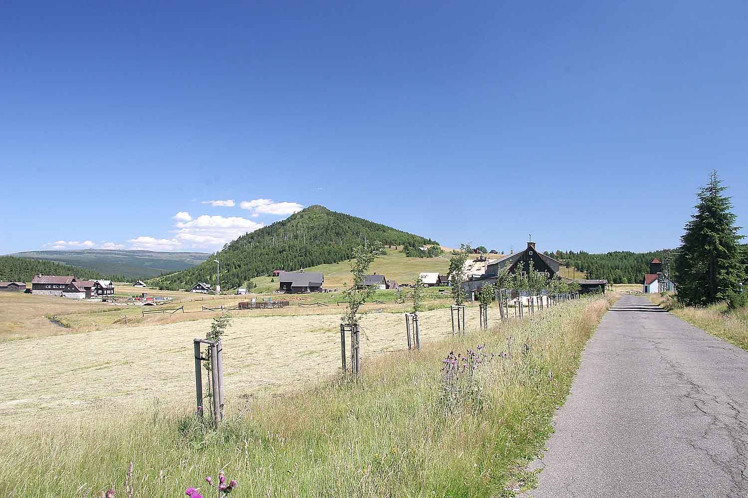 Osada Jizerka v Jizerských horách, Jizera Mountains, Jablonec nad Nisou District, Czech Republic Autor: Prazak date: 18. 7. 2006